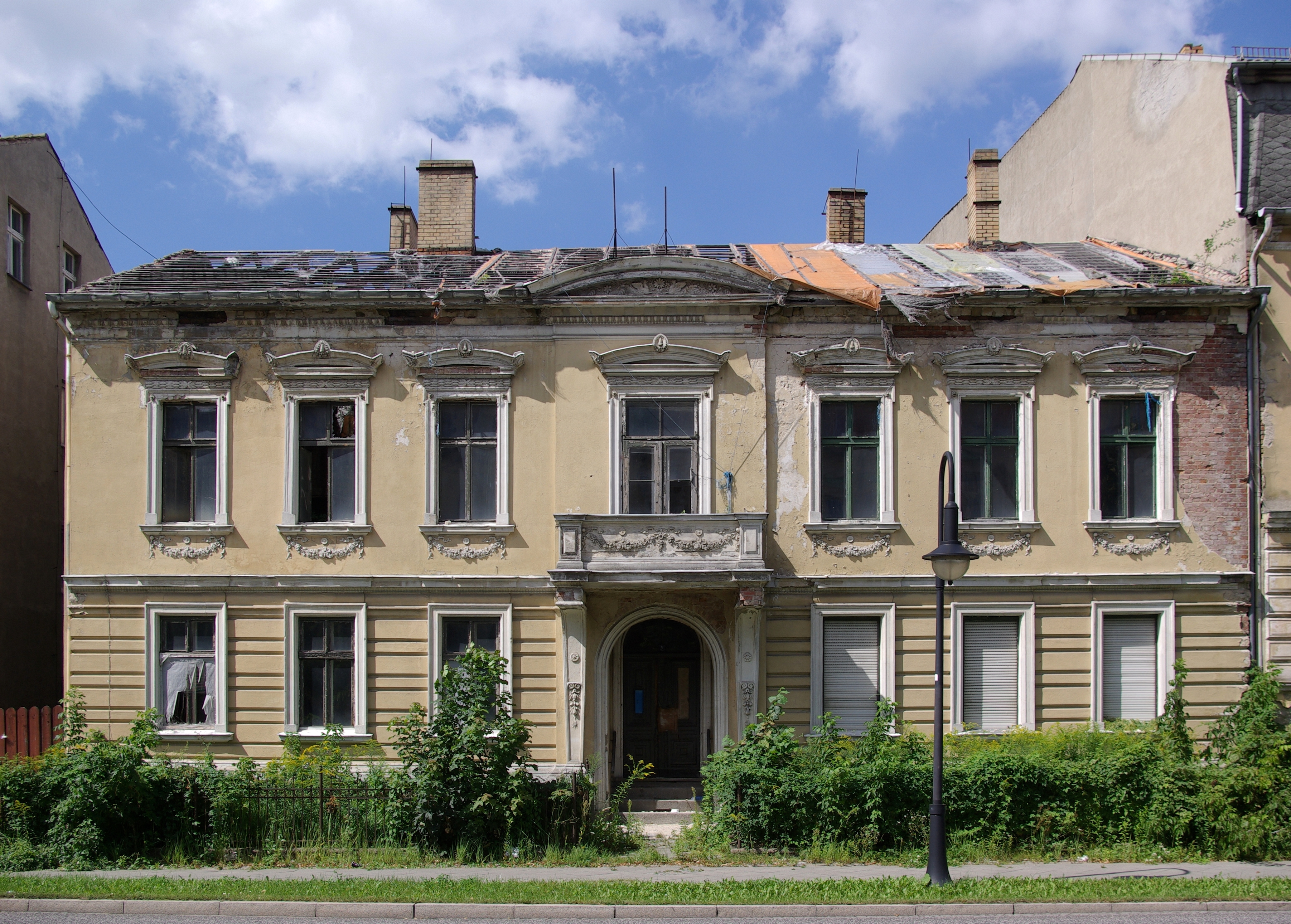 Bad Freienwalde in Brandenburg. Das Haus Bahnhofsstraße 5 steht unter Denkmalschutz.